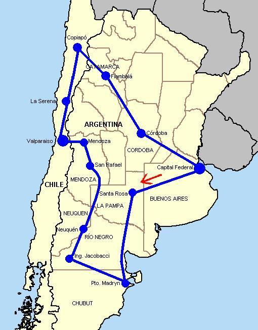 Reccorido del Rally Dakar 2009. Realizado usando Imagen:Argentina provinces, blank.png